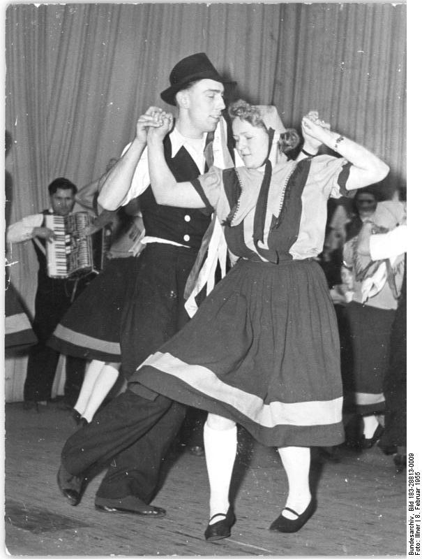 Leipzig, Auftritt der Dorfkulturgruppe aus Breitenfeld Zentralbild Illner Wjt-Qu. 12 Mot. 8.2.1955 Arbeitstagung über die Verbesserung der Volkskunstarbeit auf dem Lande. In Leipzig fand am 5. und 6. Februar 1955 eine Arbeitstagung des Ministeriums für Kultur mit über 300 Leitern der Volkskunstgruppen aus ländlichen Gebieten der DDR und Kulturfunktionären der Bezirke und Kreise statt. Gute Volkskunstgruppen aus den ländlichen Gebieten zeigten Ausschnitte ihrer Arbeit. UBz: Auftreten der Dorfkulturgruppe aus Breitenfeld-Altmark Aus dem Fasselabendtanz.